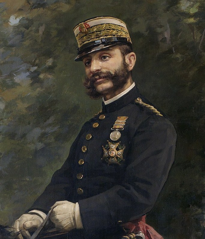 Alfonso XII, rey de España.